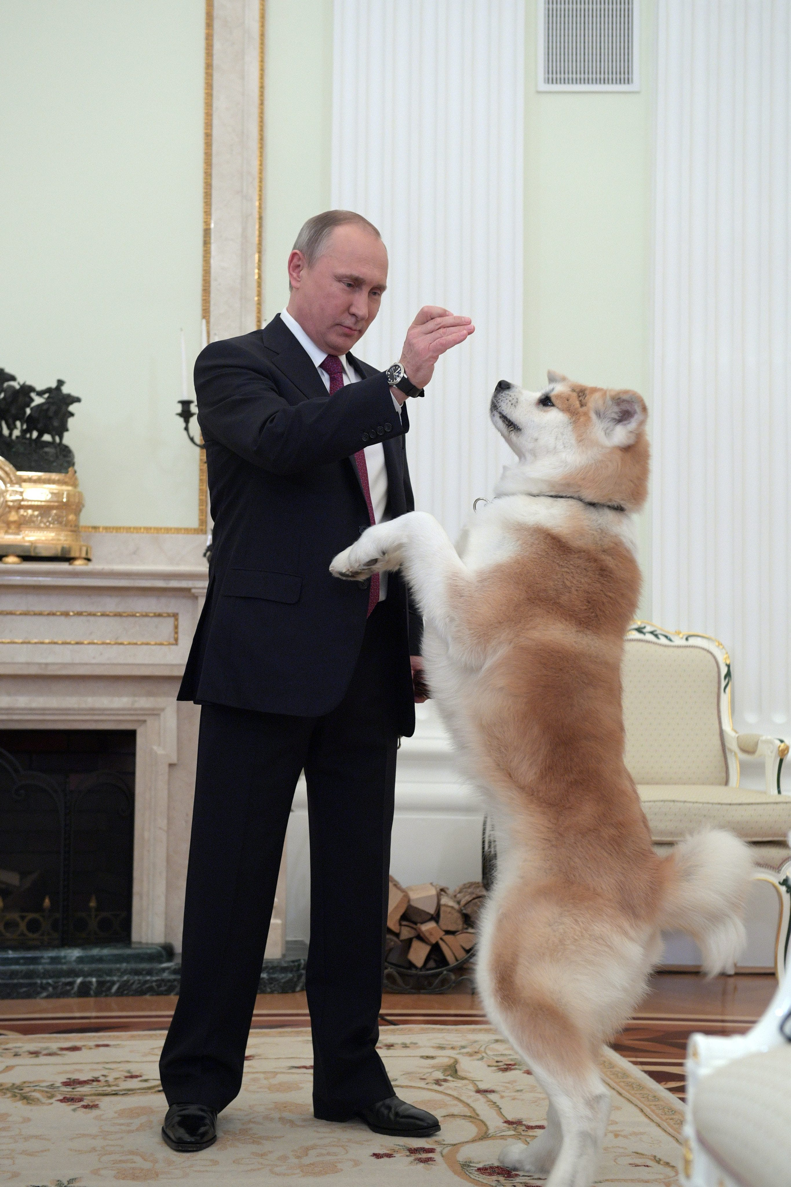 Президент России Владимир Путин с собакой Юмэ породы акита-ину